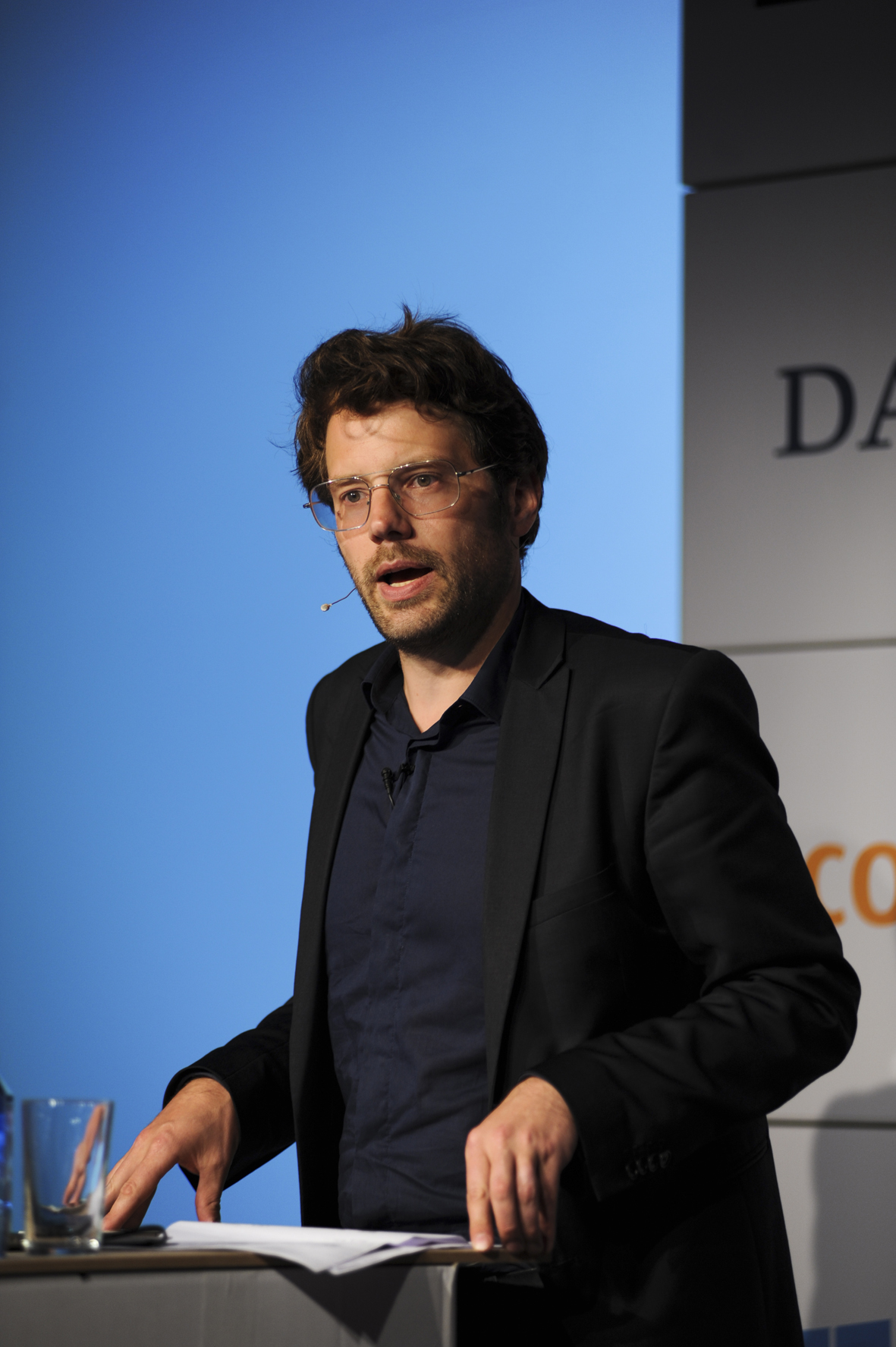 (cc) Tony Sojka I re:publica 2013